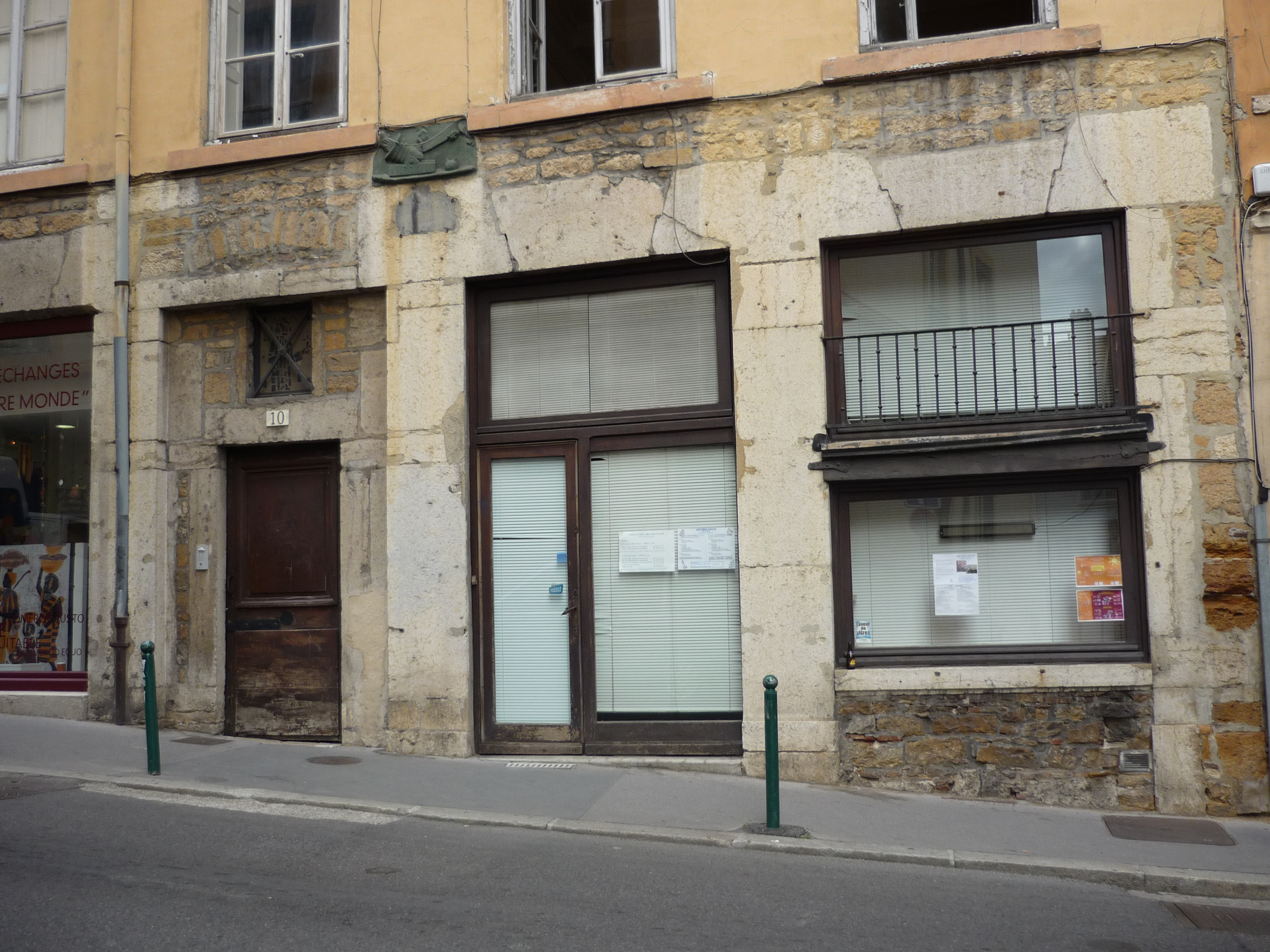 Lyon - Rue de la Bombarde, n° 10 (2)